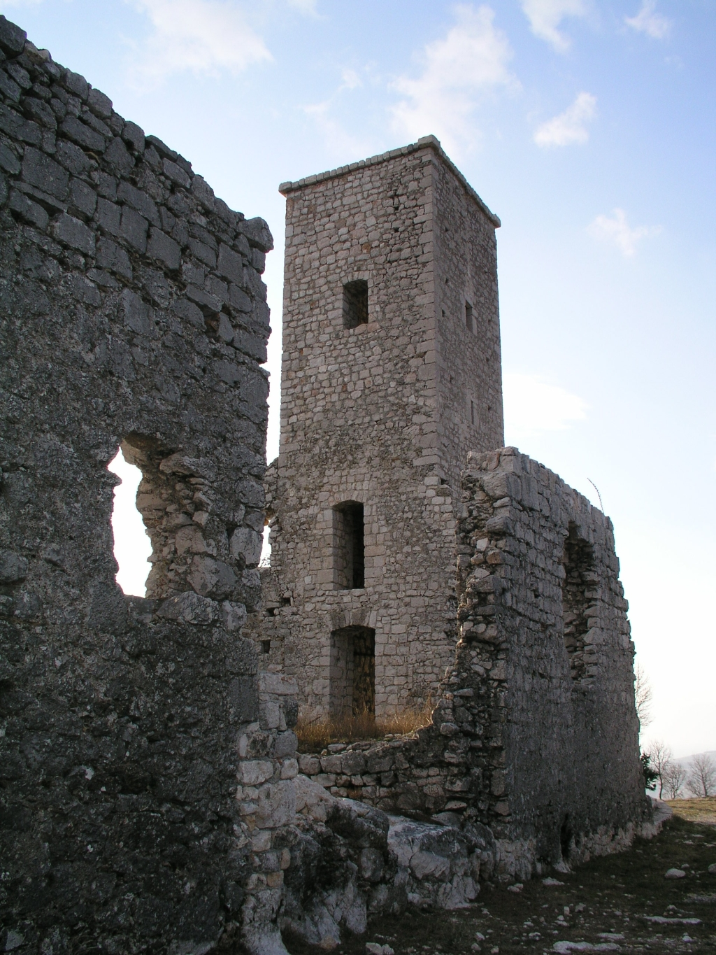 Gradina Hreljin, Hrvatska